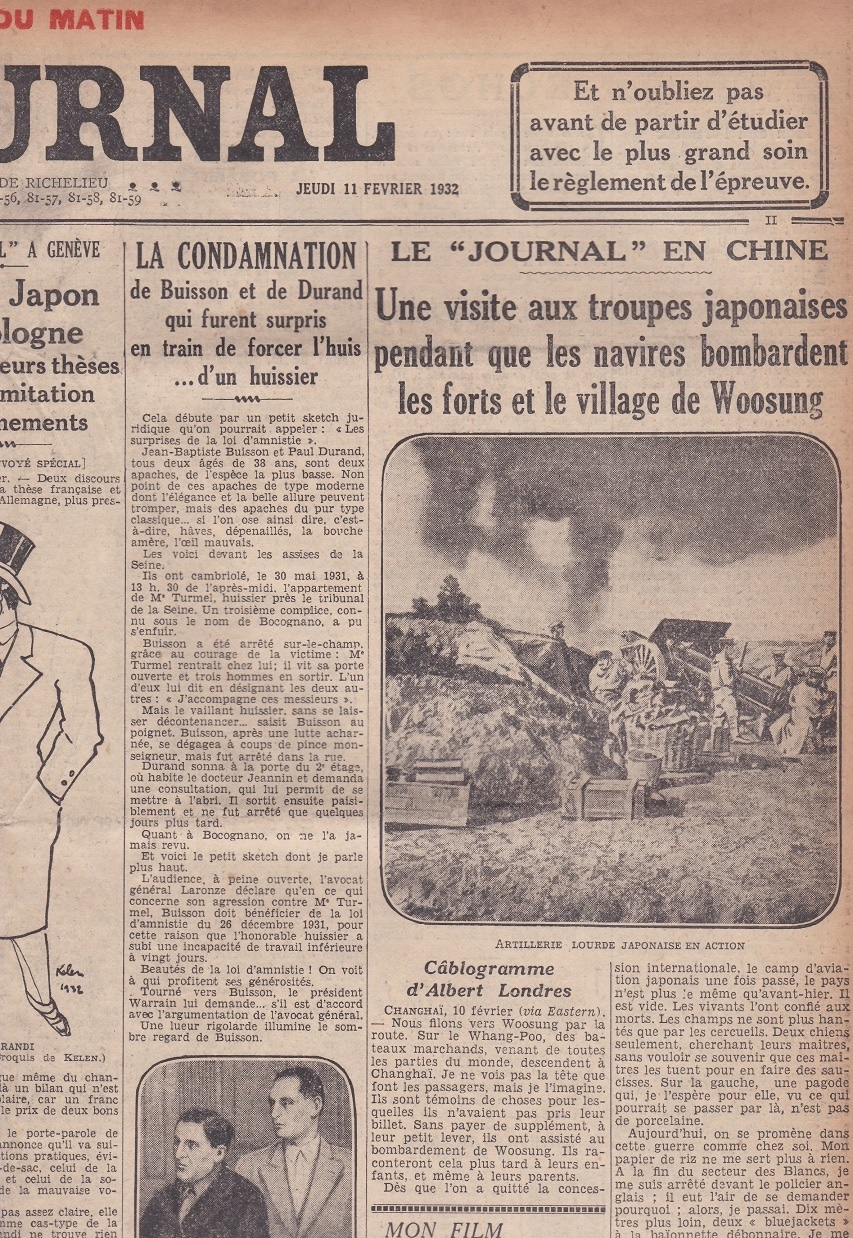 Journal prouvant que les derniers articles d'Albert Londres datent de 1932 et non de 1931 comme annoncé précédemment sur le site.